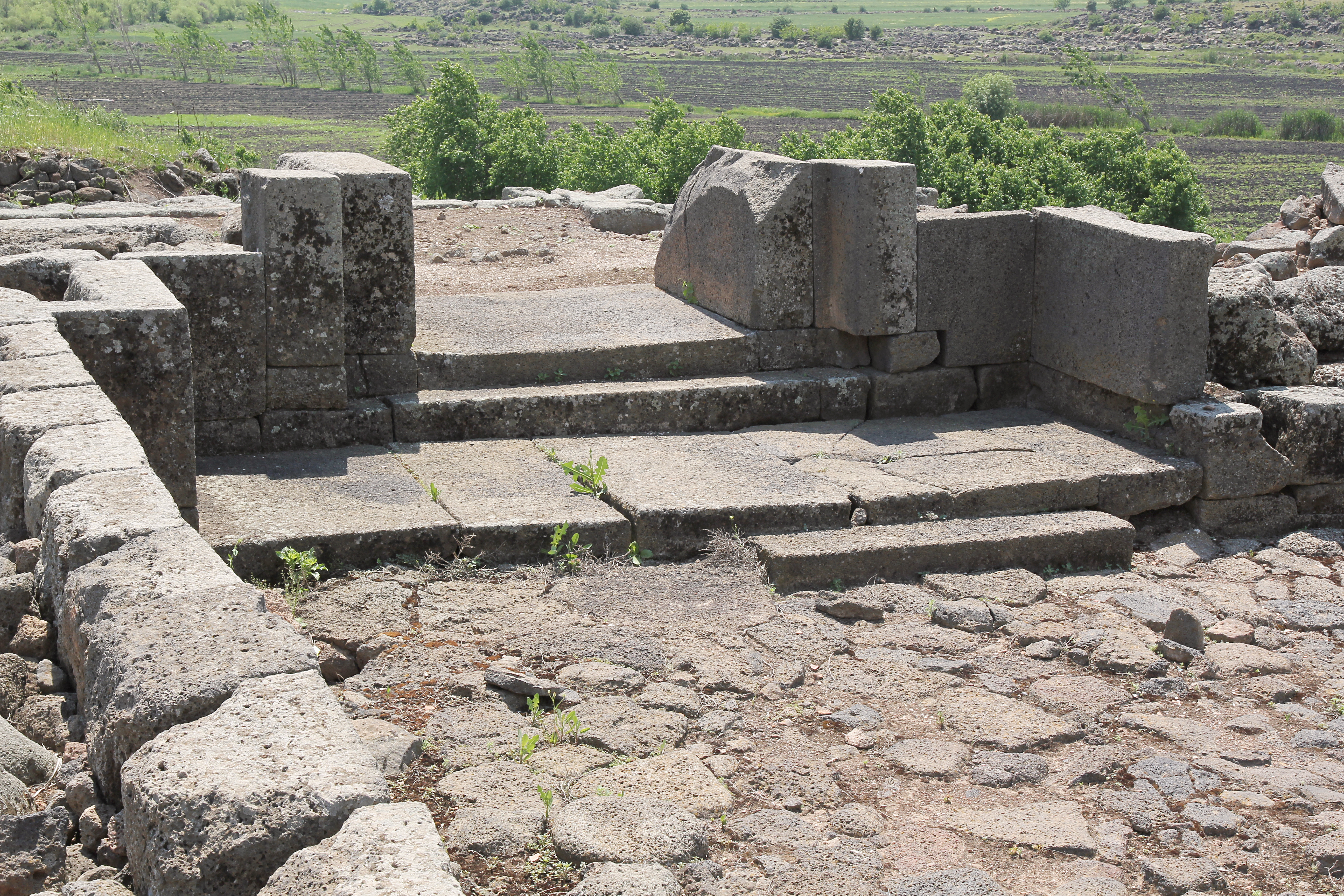 Tilmen Höyük, archäologischer Fundplatz in der Südosttürkei